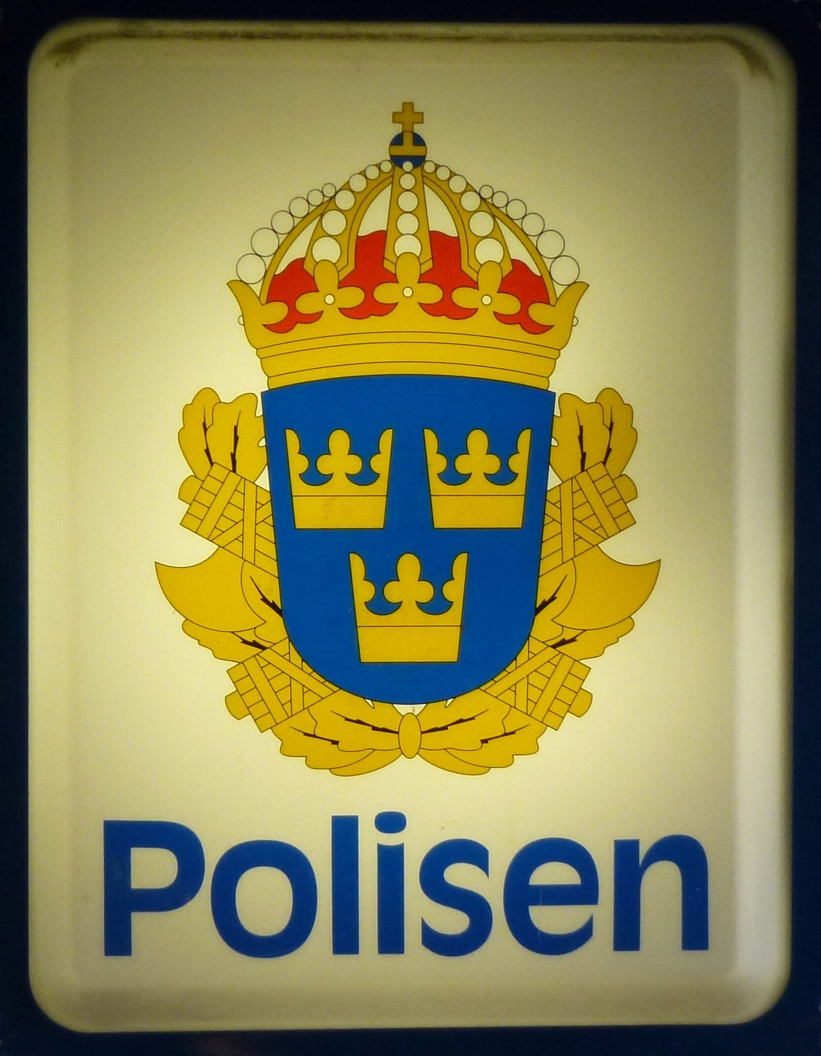 Polisens skylt vid Centralen i Stockholm 2012